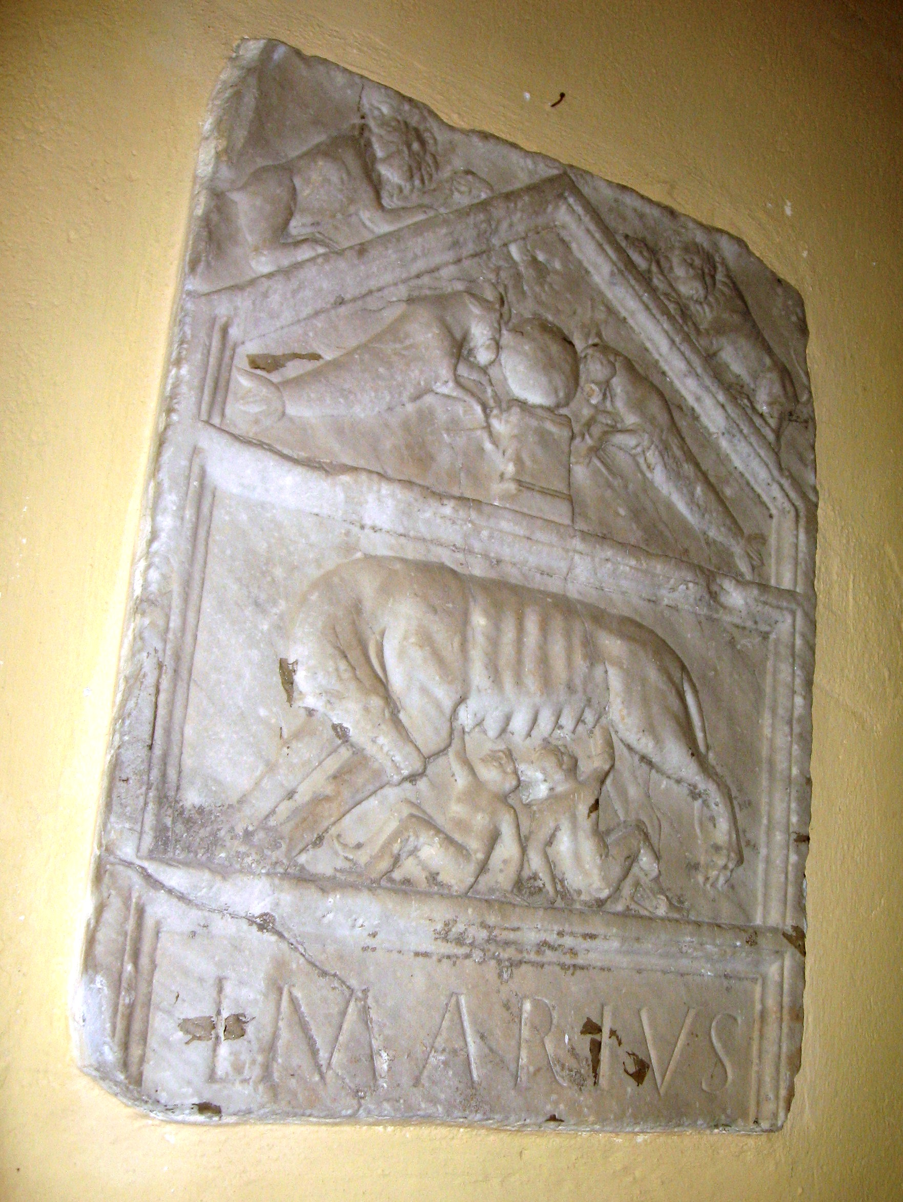 Pezzolo Valle Uzzone. Santuario del Todocco. Parte di Stele celebrativa, o funeraria, di L. Marius.